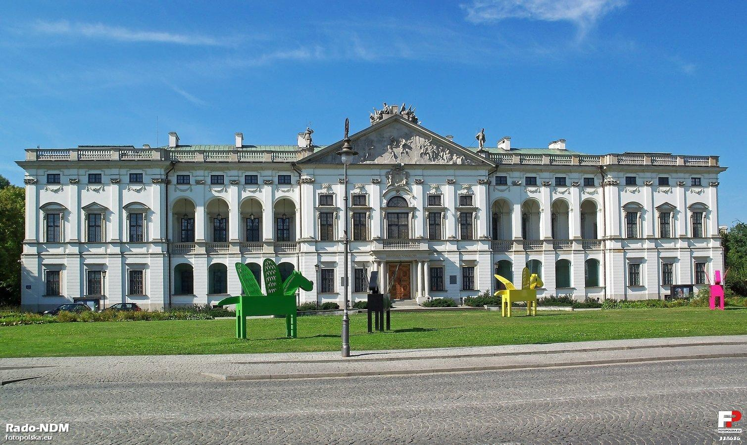 Pałac Krasińskich widziany od frontu z Placu Krasińskich